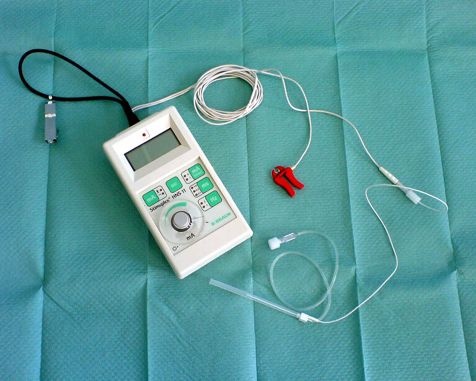 Stimuplex